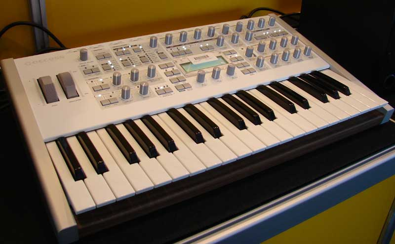 синтезатор Access Virus TI Polar на выставочном стенде